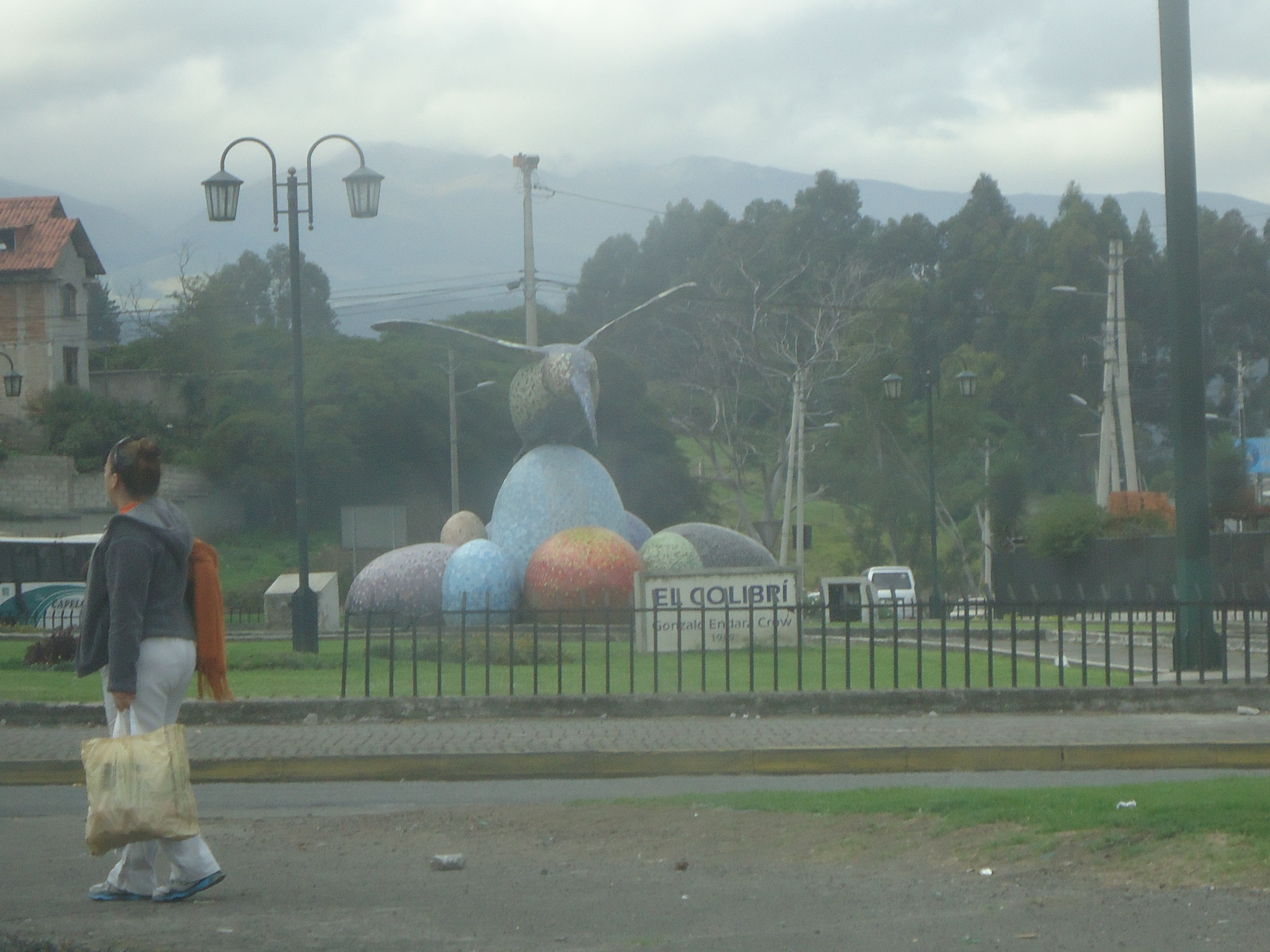 Monumento al Colibrí, Sangolquí